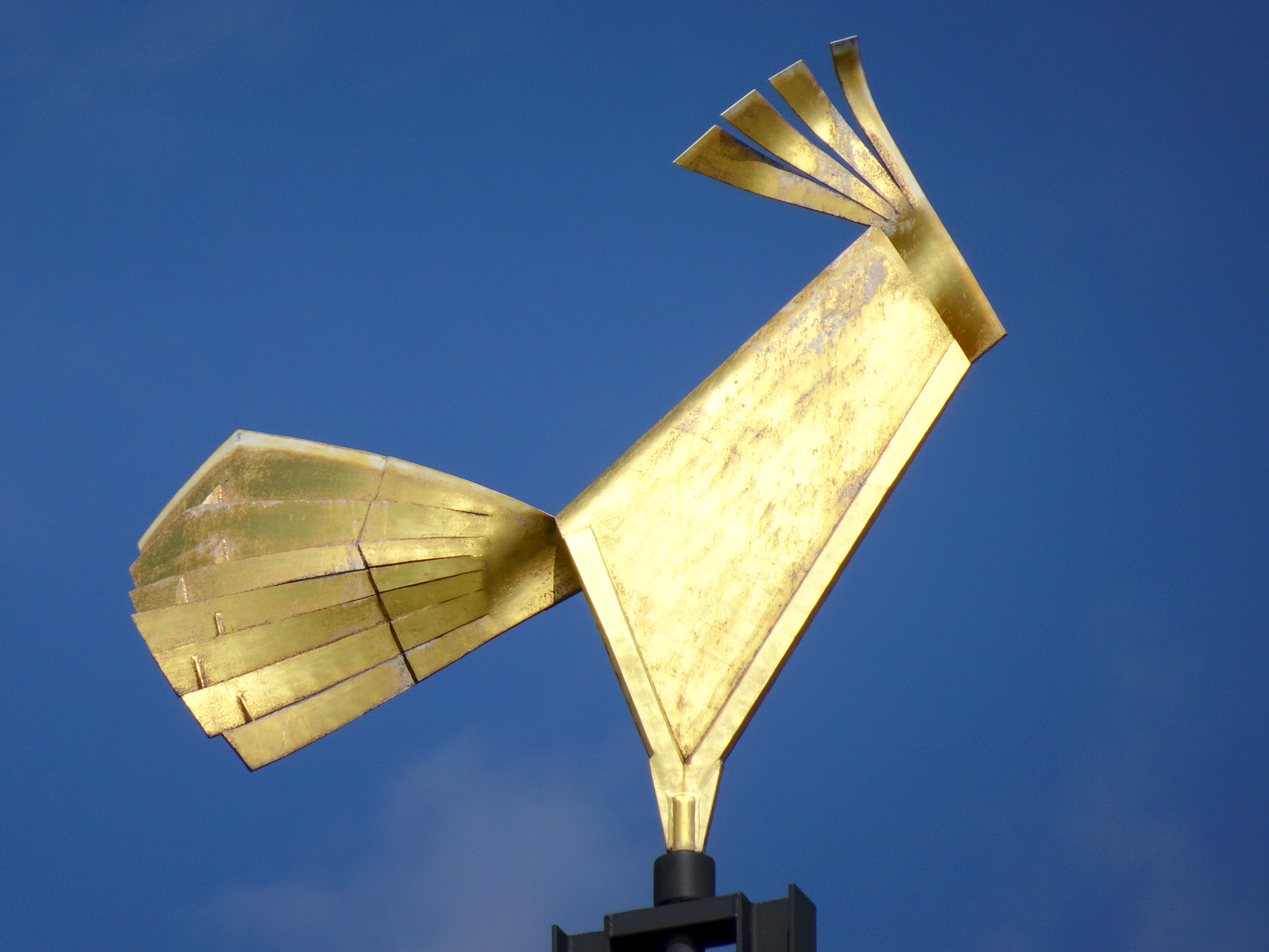 Vantörs kyrkas prisbelönta tupp